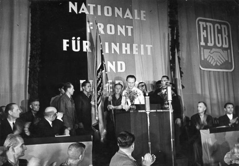 Stickstoffwerk Piesteritz, FDGB Wandefahne Illus -Philipps FDGB-Wanderfahne an Stickstoffwerk Piesteritz (siehe Begleittext) Die Übergabe der FDGB-Wandefahne durch den 2. Vorsitzenden der IG-Chemie, Kämmer, an die Piesteritzer Arbeiter. 14.7.49 3596-49